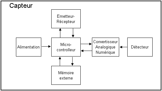 Schéma d'un capteur (mote en anglais) sans fil